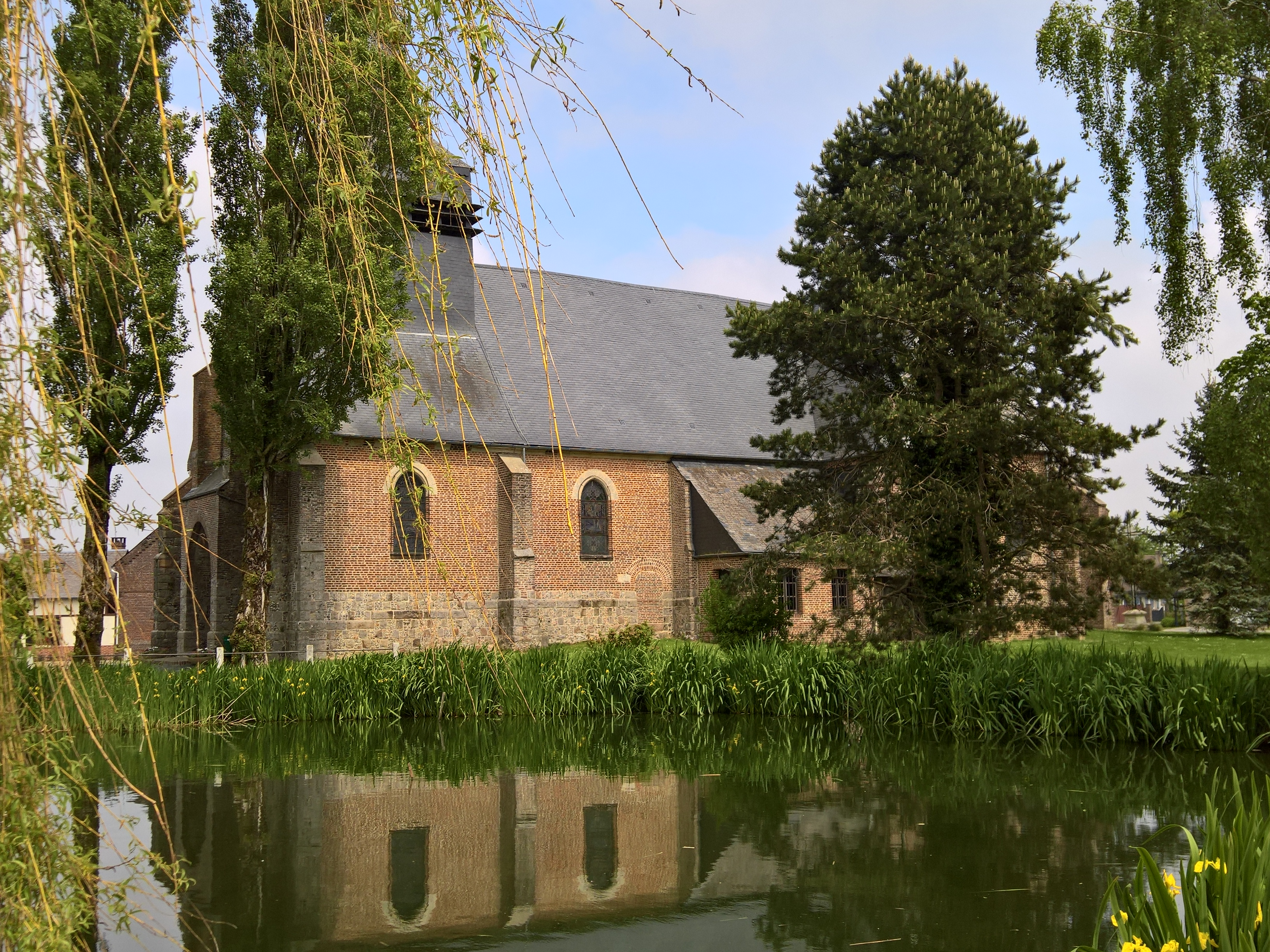 Blargies : L'église Saint-Martin et la mare